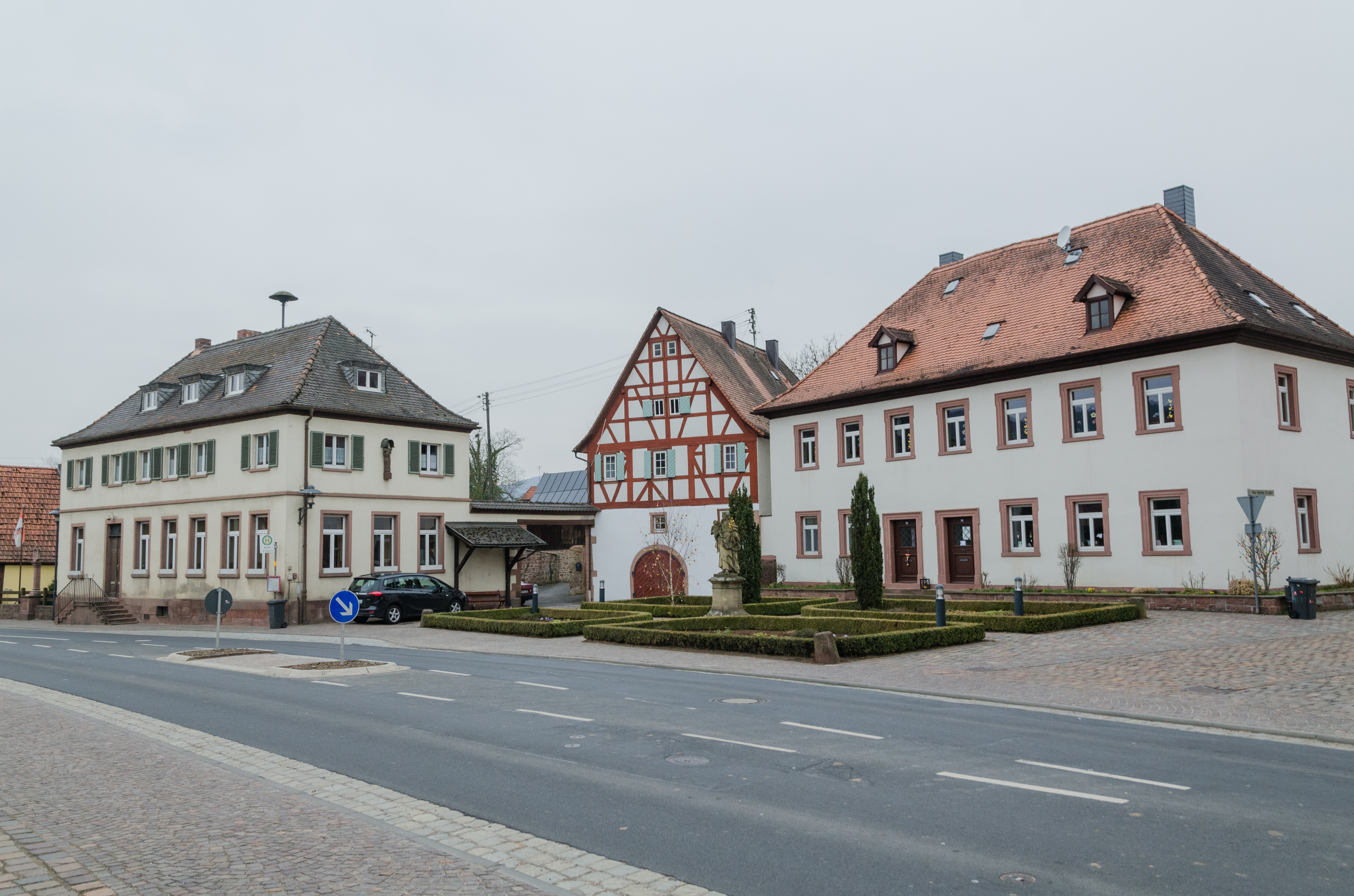 Lohr, Steinbach, Steinbacher Straße 24, 22, 20, 18